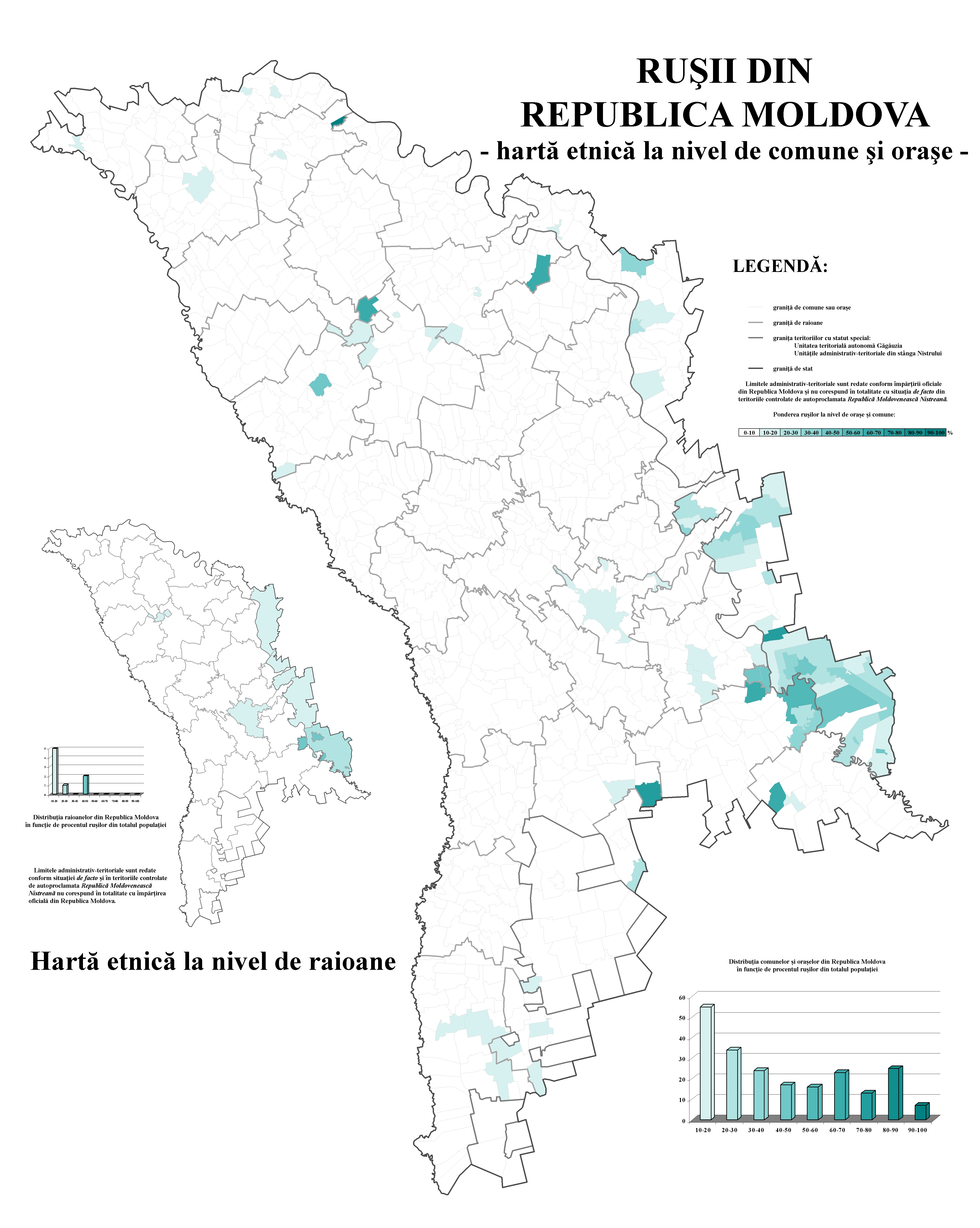 Ponderea ruşilor în Republica Moldova la nivel de comune conform datelor recensământului din 2004